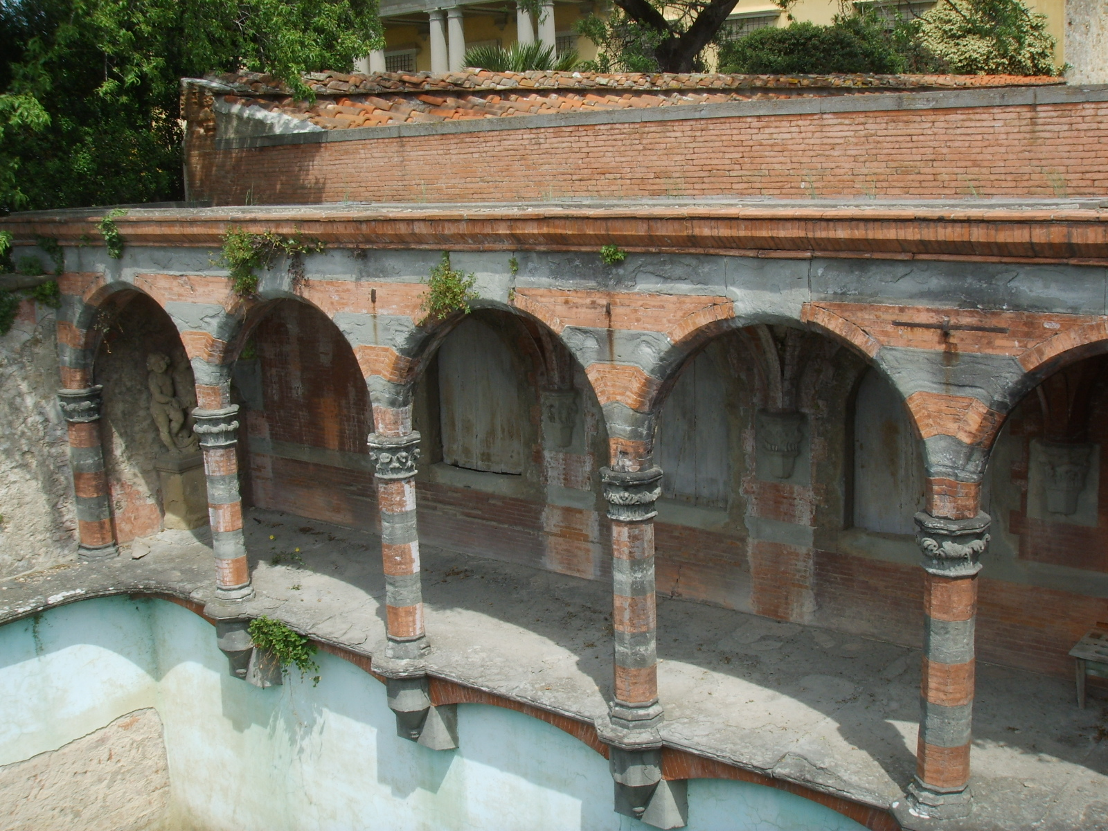 Villa di maiano, vasca neogotica